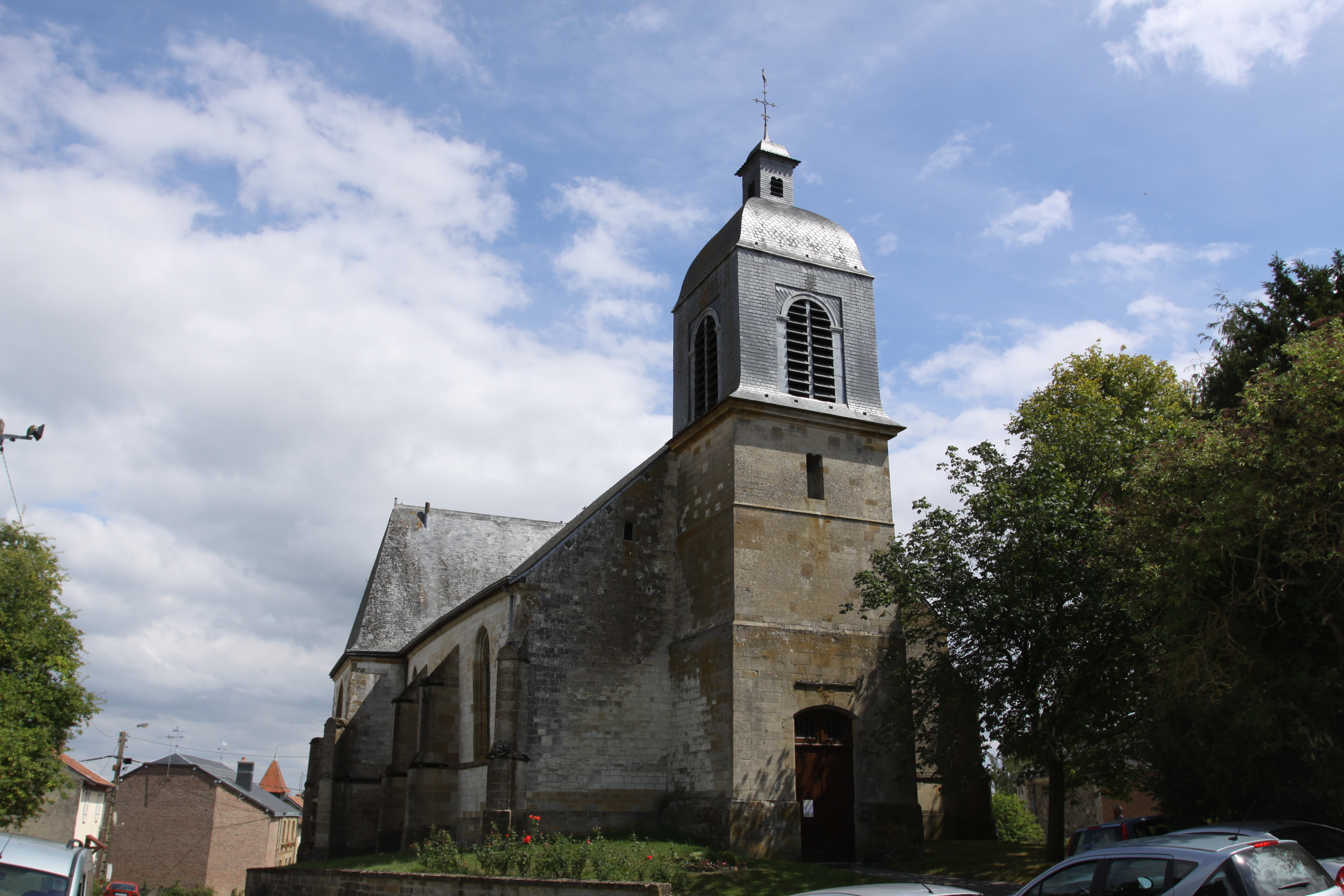 Église Saint-Maurice de Saint-Morel (Ardennes, France) .